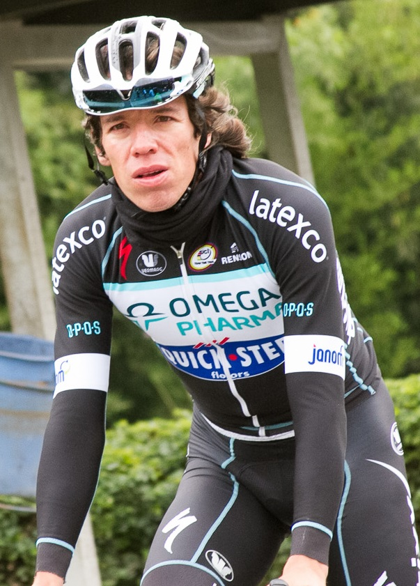 Rigoberto Urán con el maillot del Omega Pharma-Quick Step 2014